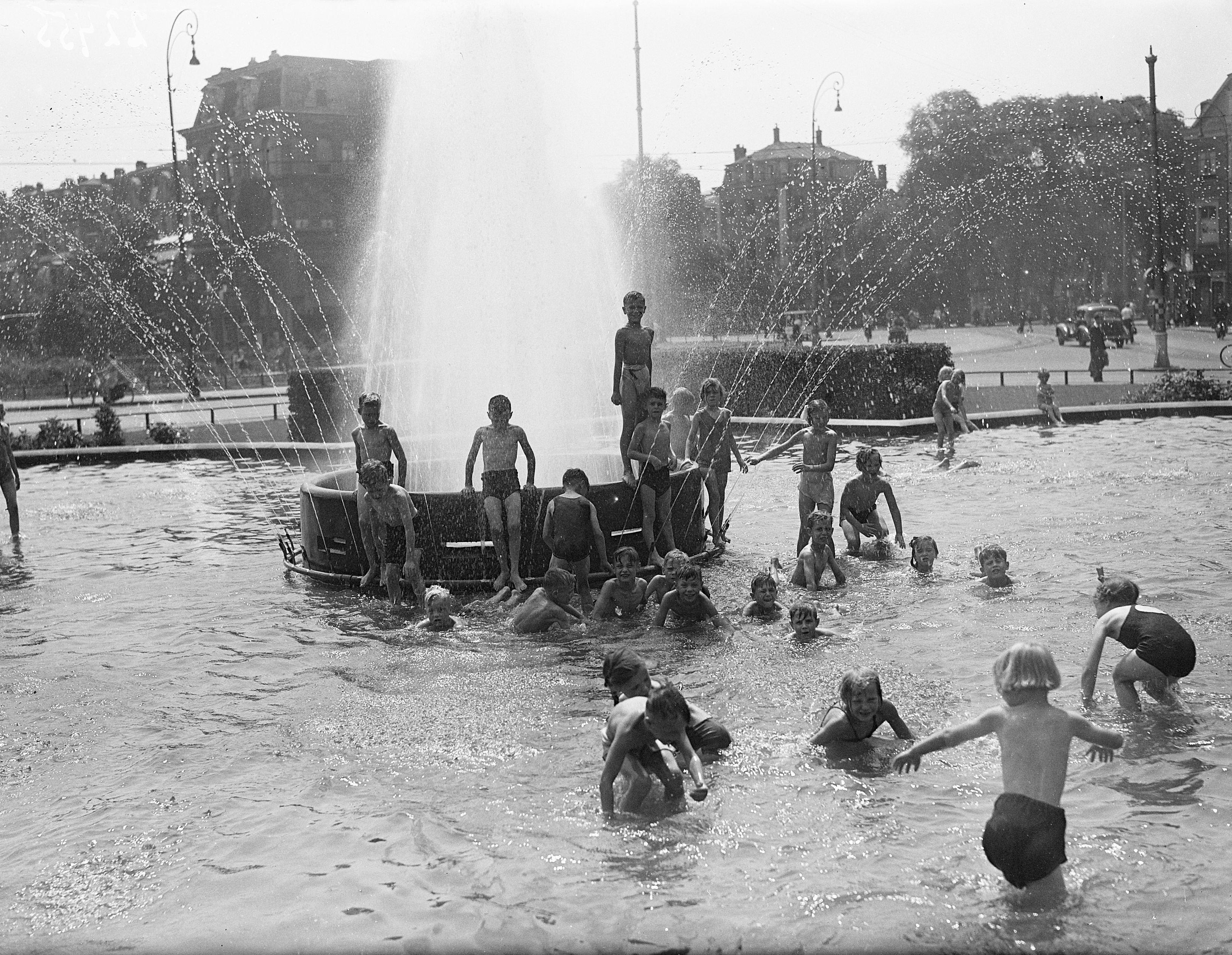 Collectie / Archief : Fotocollectie Anefo Reportage / Serie : [ onbekend ] Beschrijving : Fontein op Frederiksplein. Jeugd in de hitte Datum : 28 juni 1947 Locatie : Amsterdam, Noord-Holland Trefwoorden : baden, fonteinen, jeugd, zomer Fotograaf : Noske, J.D. / Anefo Auteursrechthebbende : Nationaal Archief Materiaalsoort : Glasnegatief Nummer archiefinventaris : bekijk toegang 2.24.01.09 Bestanddeelnummer : 902-2455